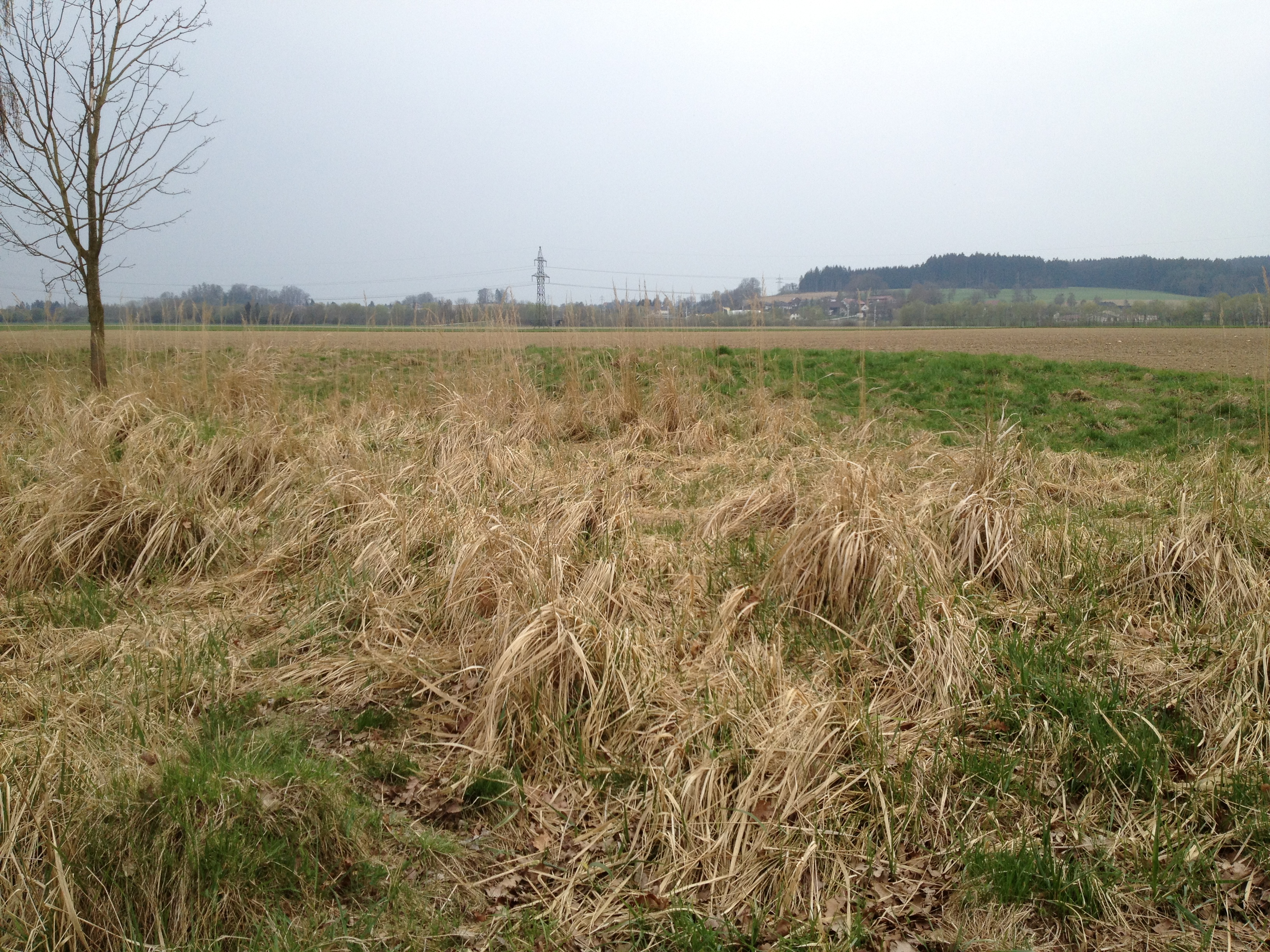 Tergolape